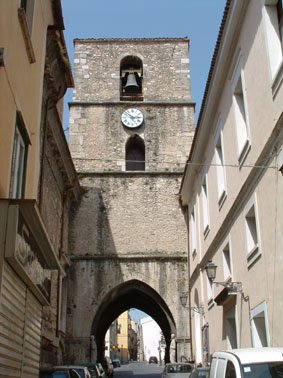 Arco di S.Pietro a Isernia - Italy